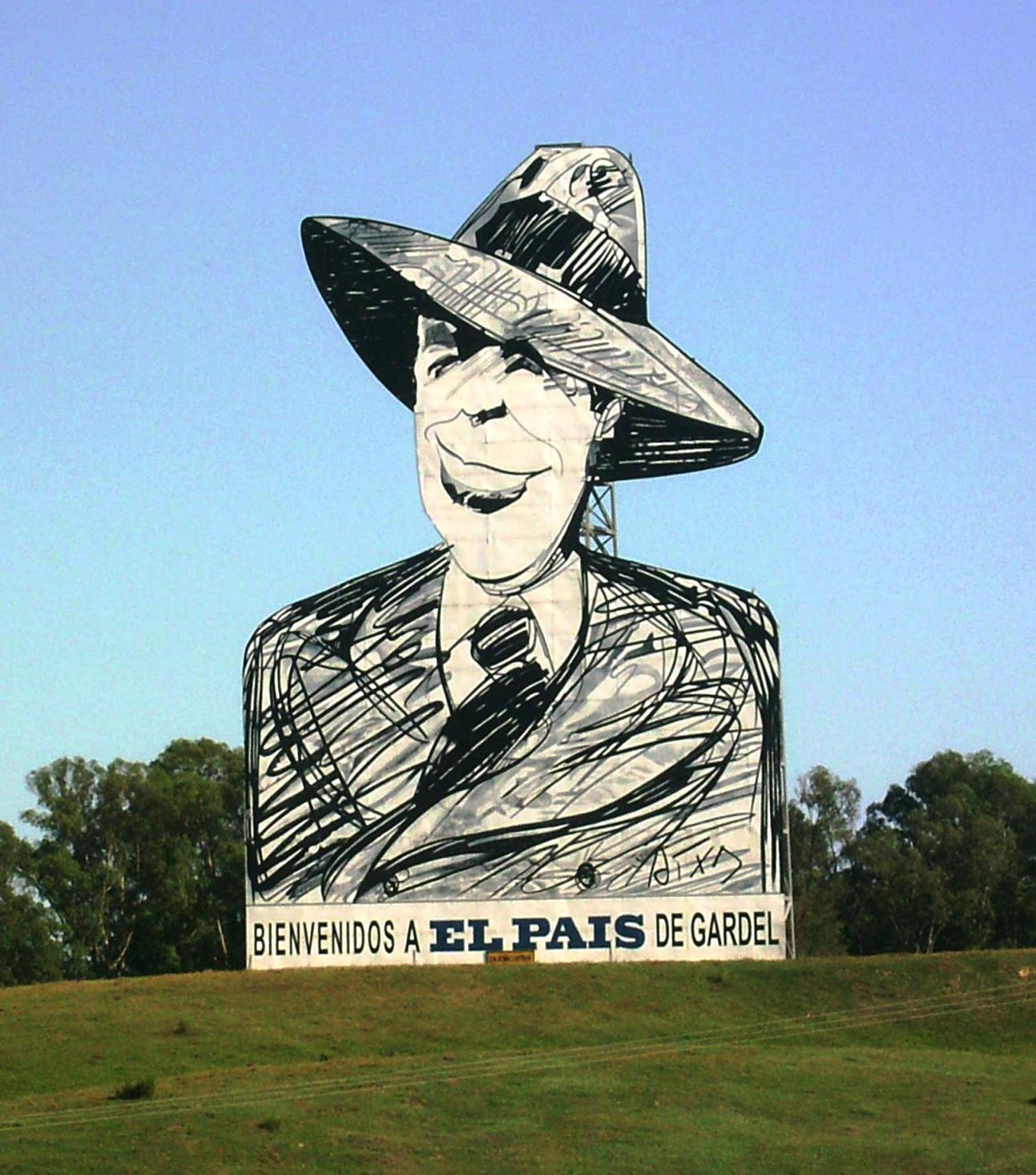 Caricatura gigantesca de Arotxa a la entrada de la ciudad de Tacuarembó